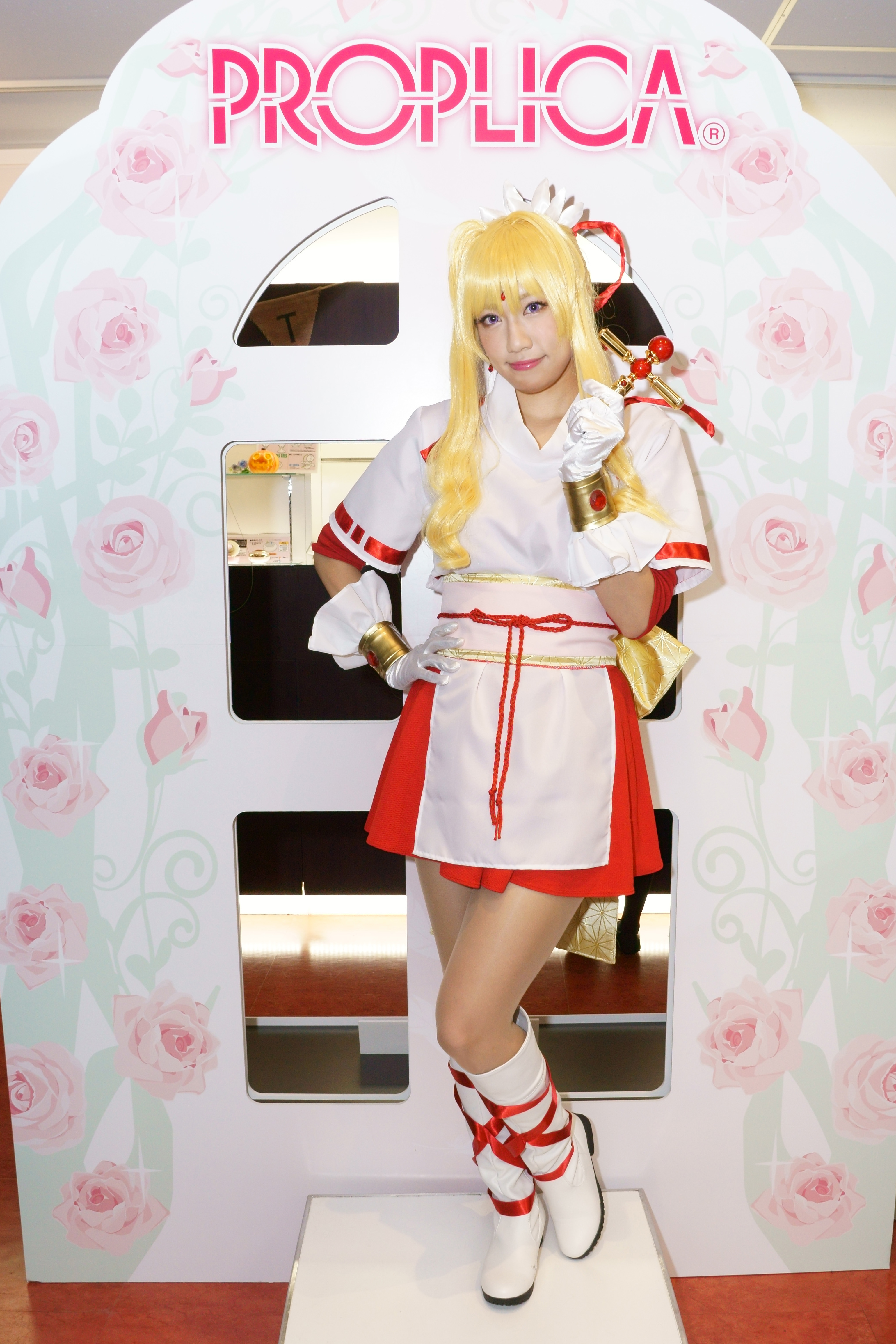 神風怪盗ジャンヌ "怪盗ジャンヌ"